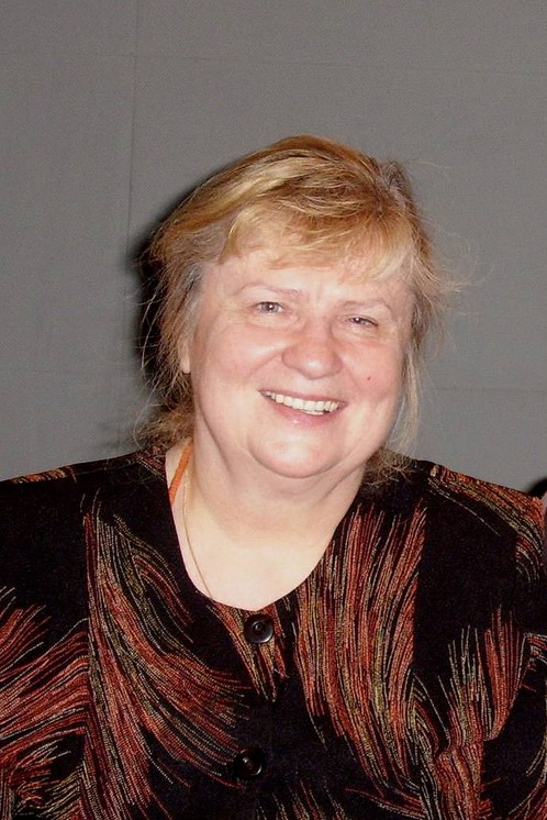 Stanisława Celińska (ur. 29 kwietnia 1947 w Warszawie) - polska aktorka teatralna i filmowa